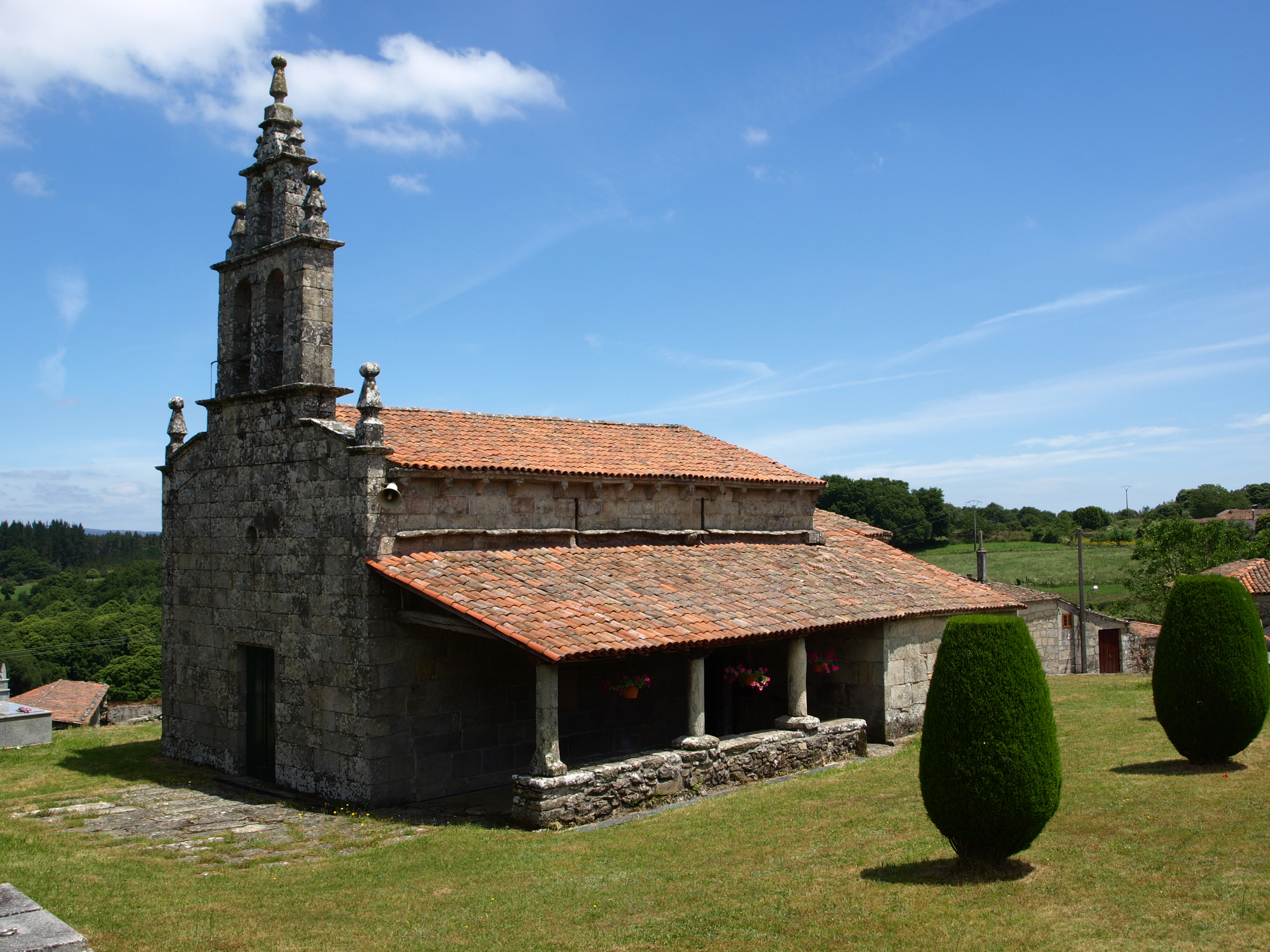 Igrexa parroquial de Santiago de Amoexa (Antas de Ulla)